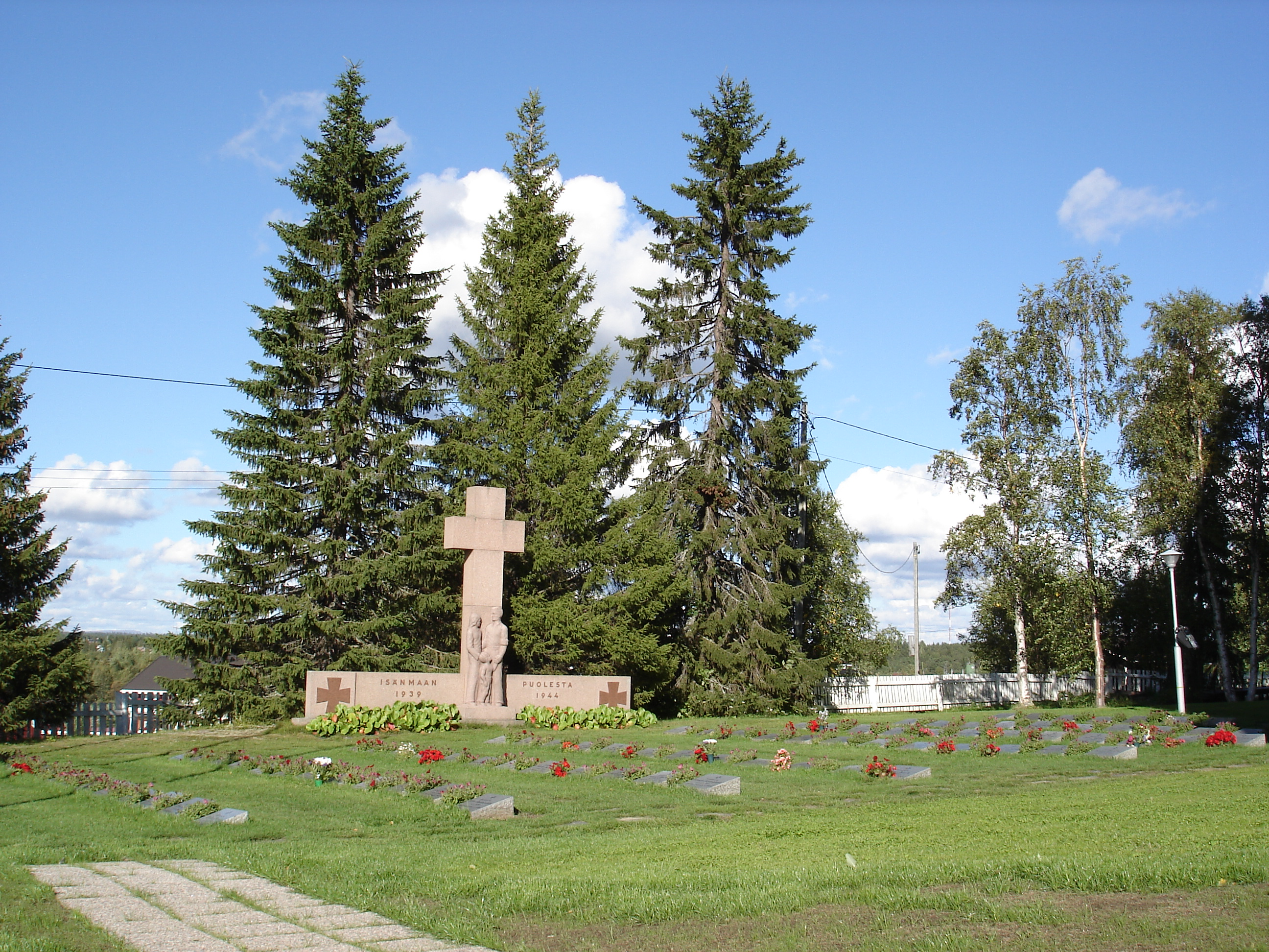 "Sotaan lähtö" ja sankarihautausmaa Muonion Kirkolla